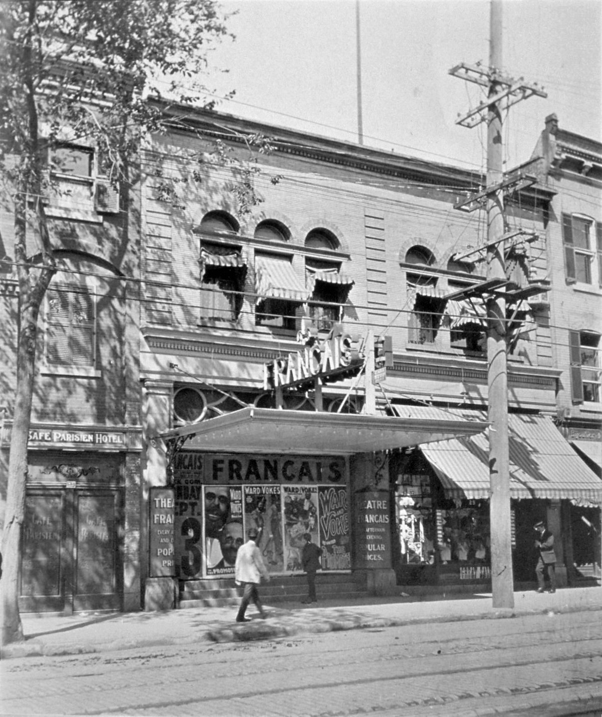 Théâtre français, rue Sainte-Catherine Est, Montréal À l'affiche : Ward and Vokes